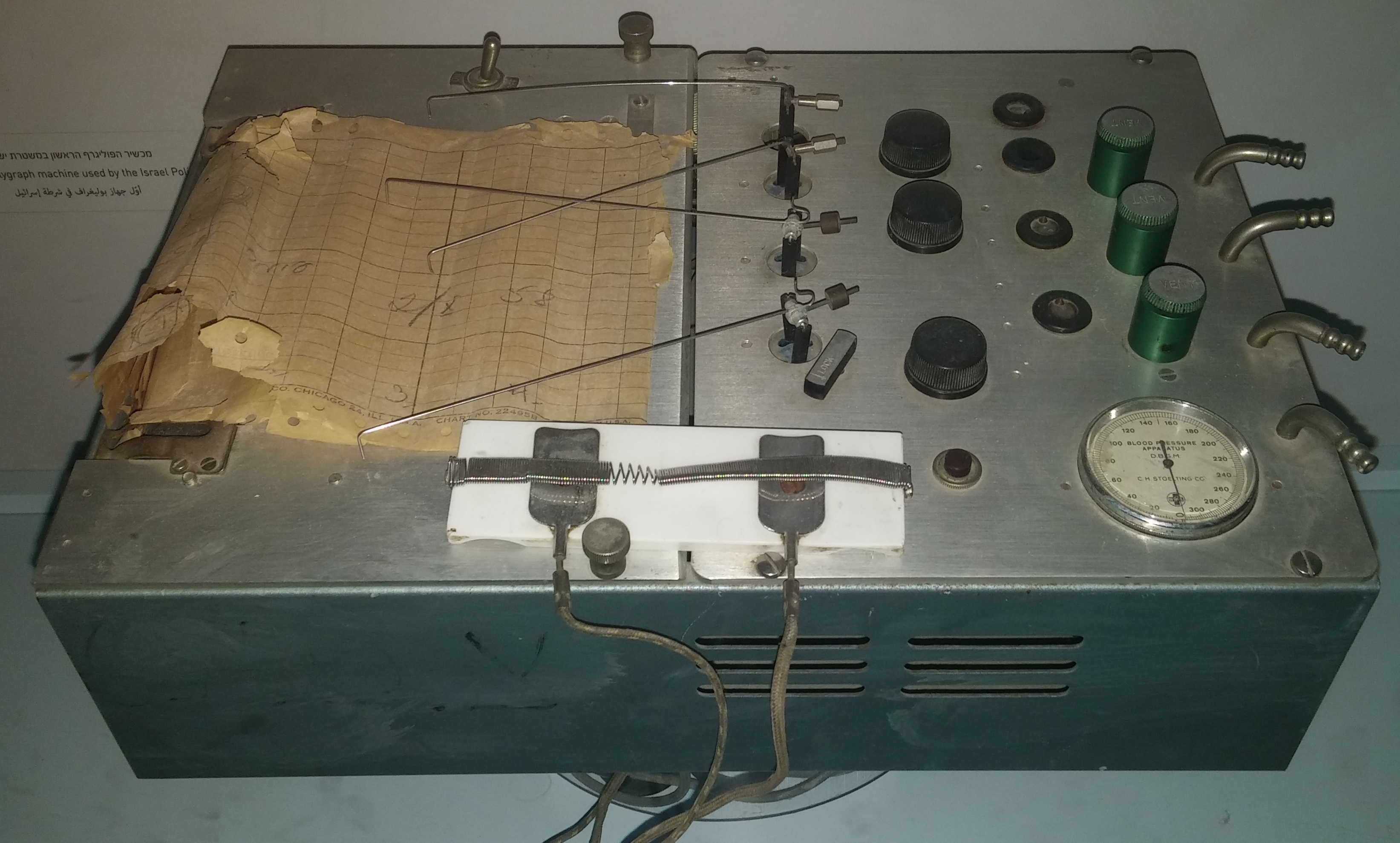 הפוליגרף הראשון של משטרת ישראל